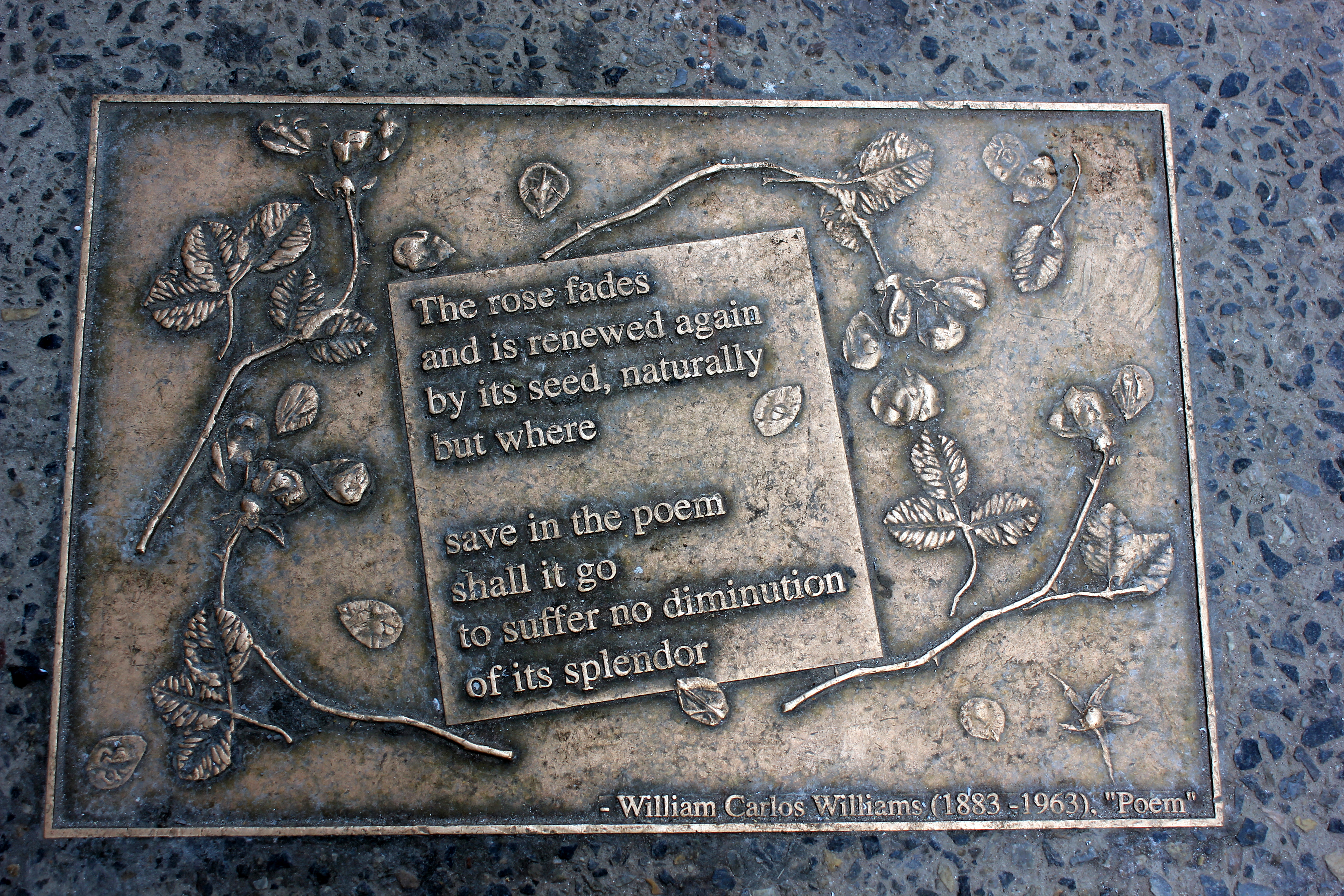 Library Walk New York City